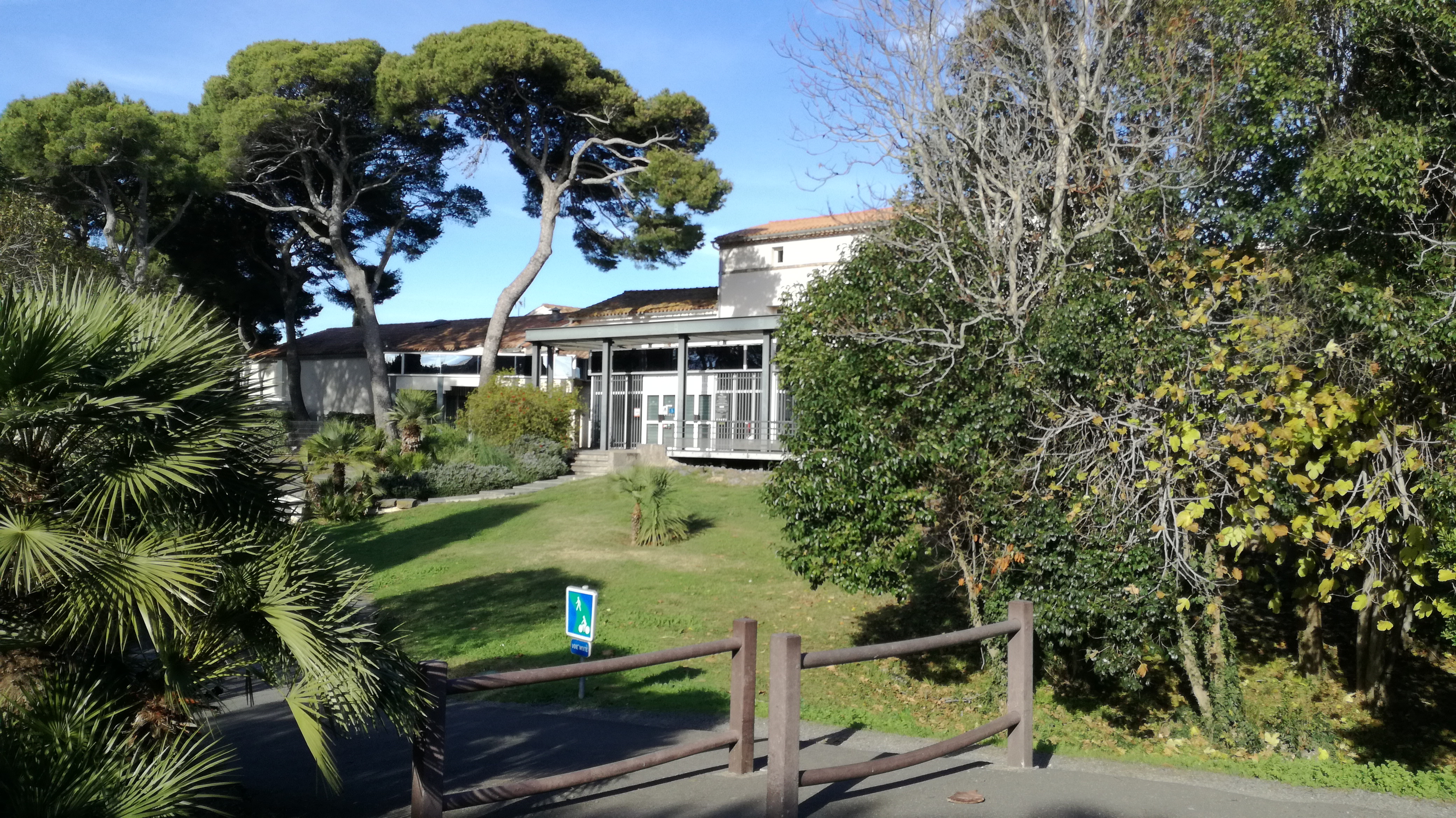 Musée de l'Ephèbe Archéologie Sous-Marine